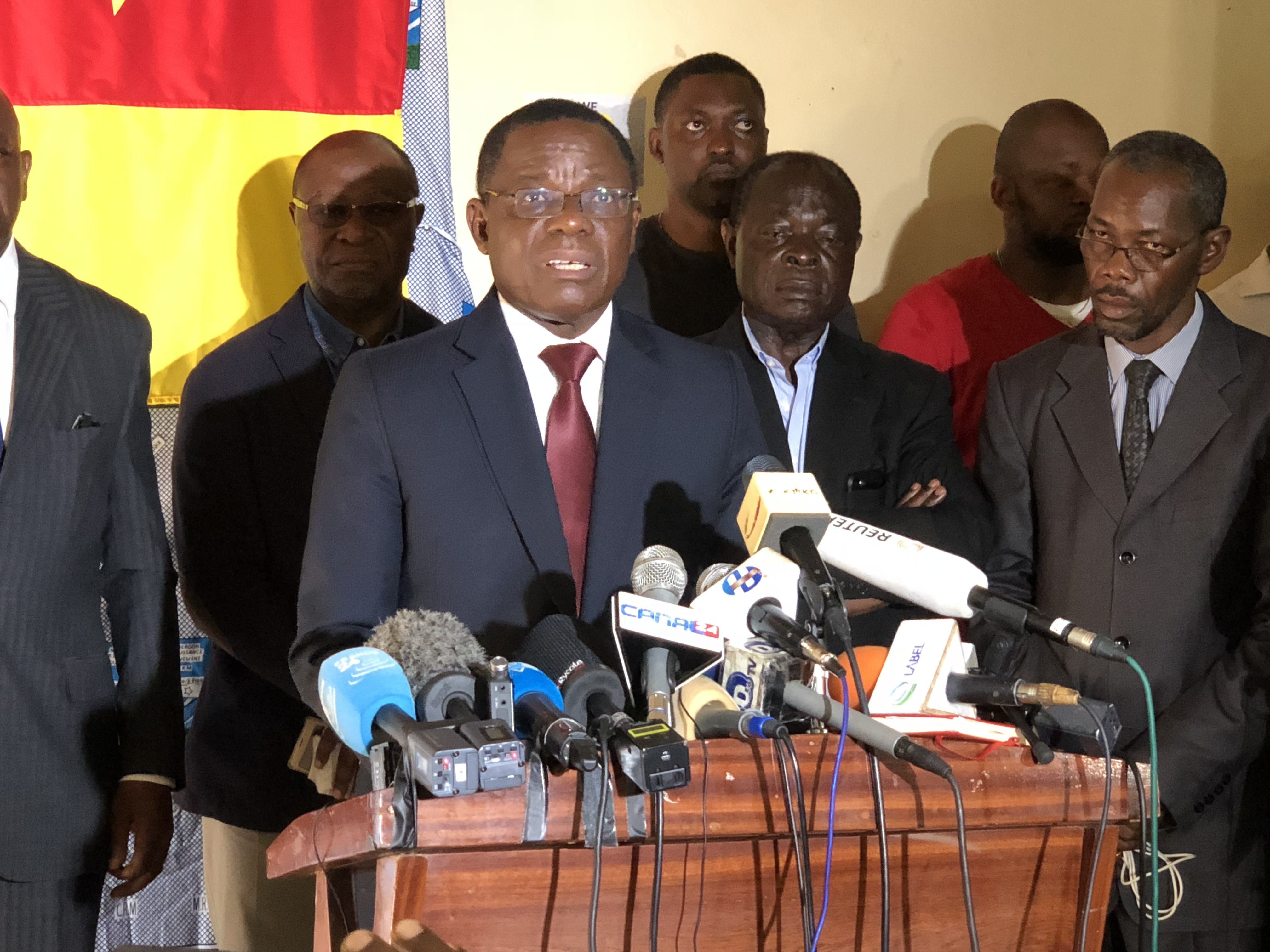 Le Camerounais Maurice Kamto annonce sa victoire à la présidentielle camerounaise en conférence de presse à Yaoundé, le 8 octobre 2018. (VOA/Bagassi Koura) M. Kamto, arrivé deuxième derrière M. Biya avec 14,23% des voix, conteste les résultats et affirme avoir remporté le scrutin.